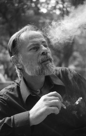 Csalog Zsolt portréja (Budapest, 1989)